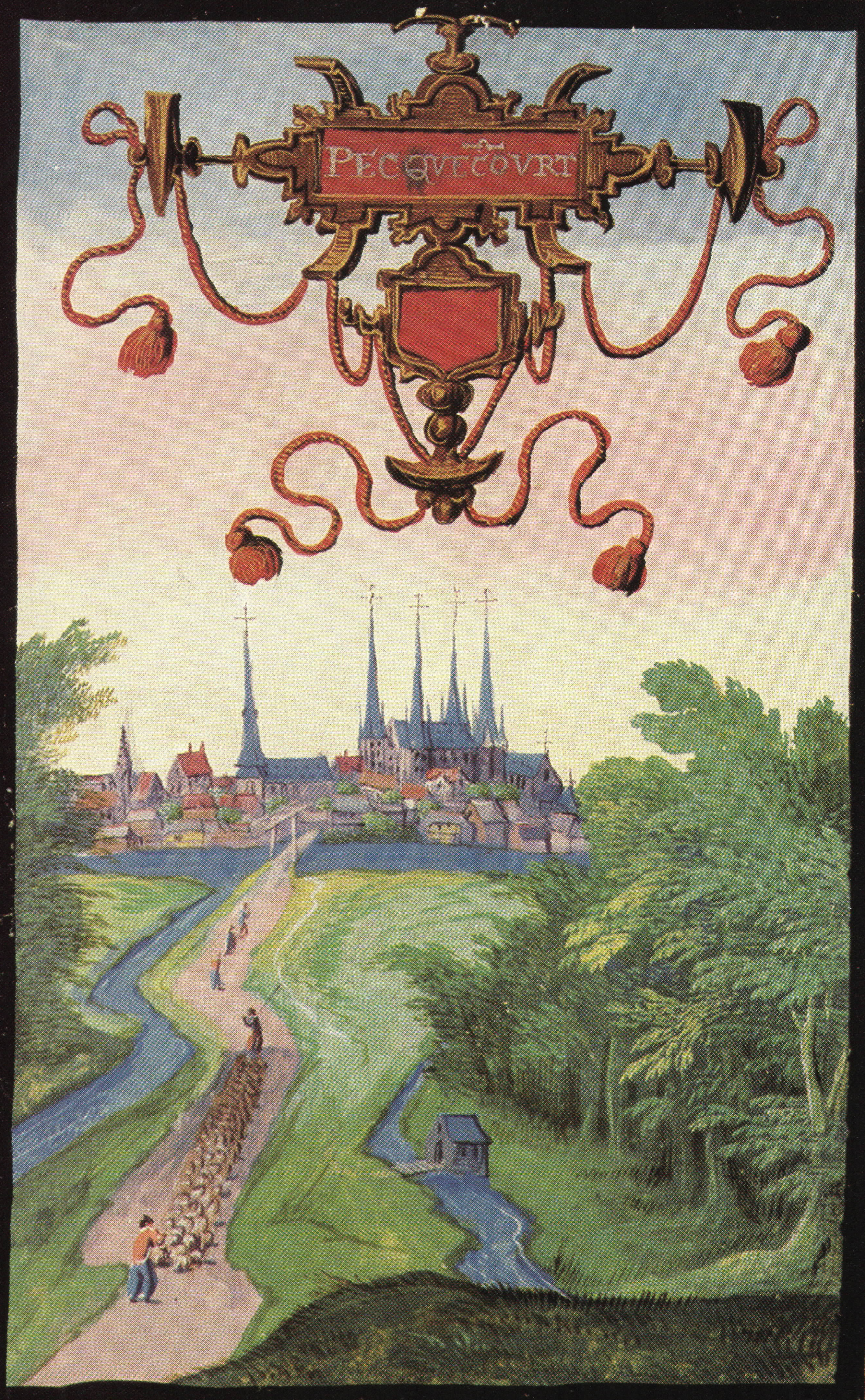 Cartulaire de Pecquencourt représentant l'Abbaye d'Anchin